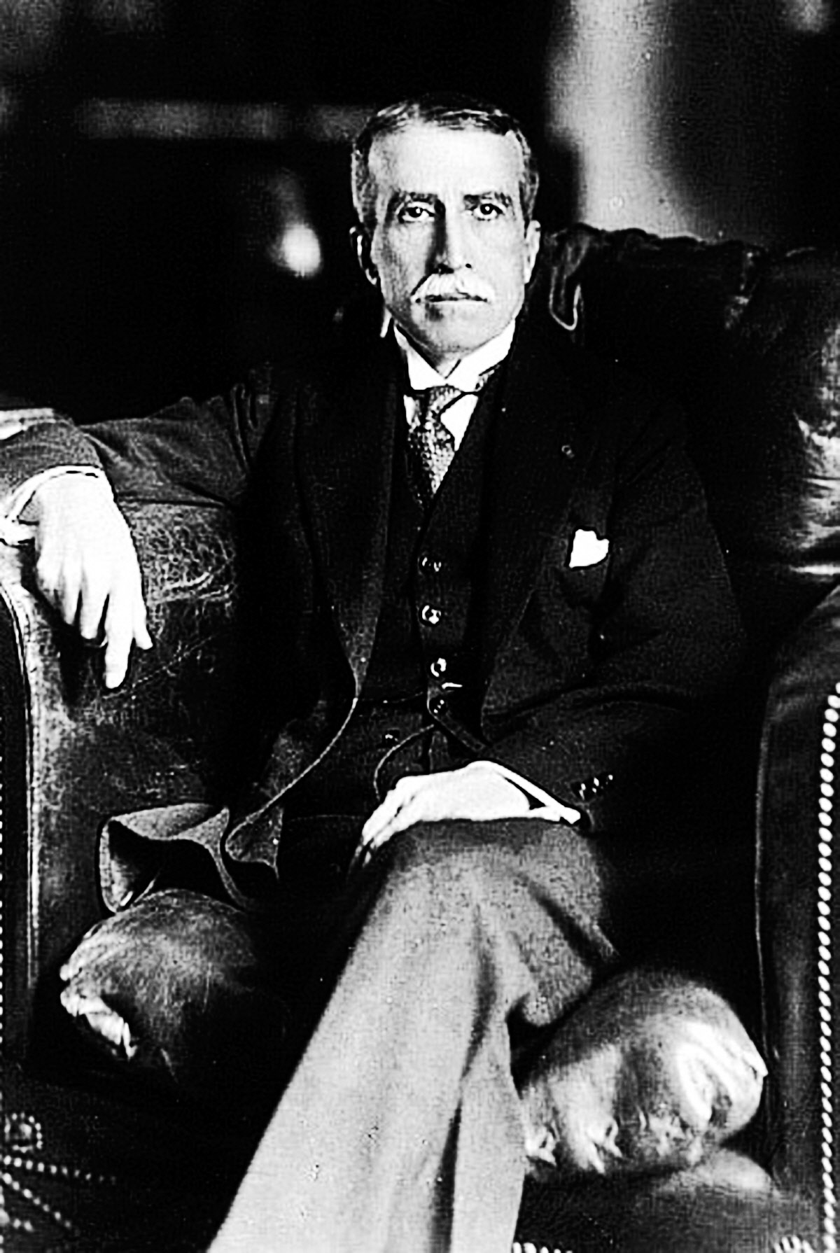 Augusto Bernardino Leguía y Salcedo (1863 - 1932). Presidente del Perú en dos ocasiones, de 1908 a 1912 y de 1919 a 1930.